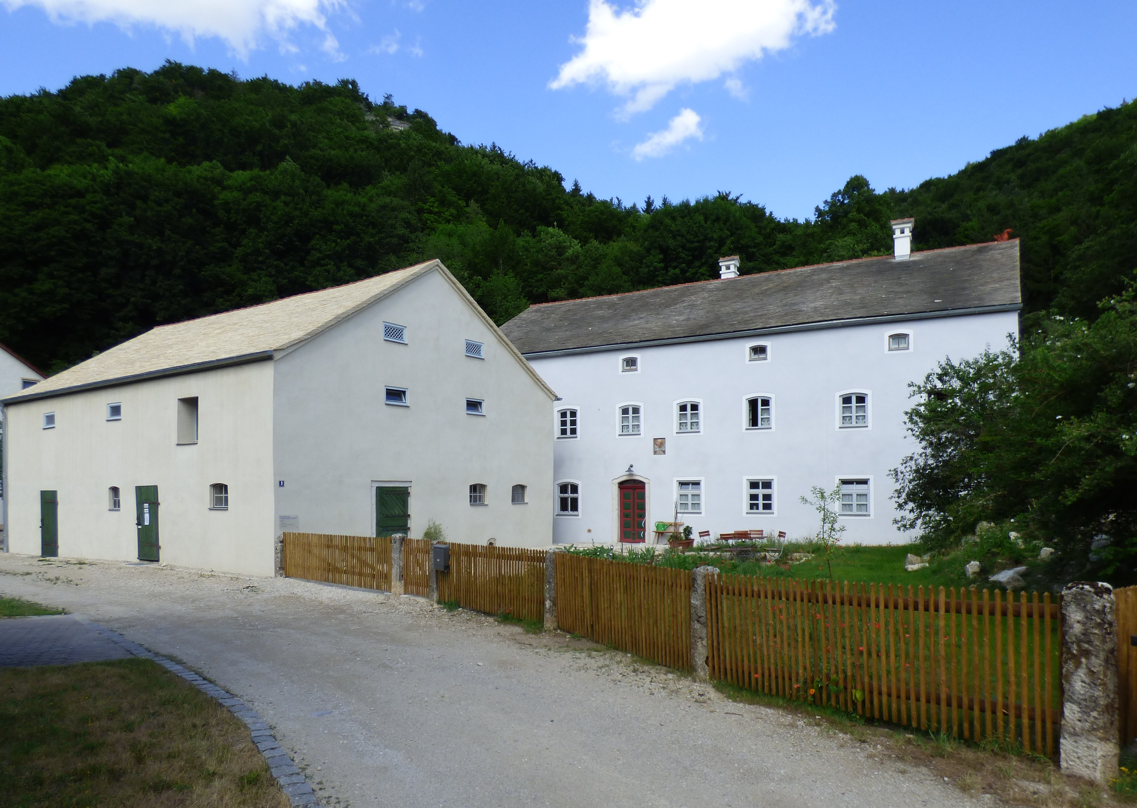 Stallstadel und Wohn-Mühltrakt der Obermühle in Mühlbach (Dietfurt a.d. Altmühl)